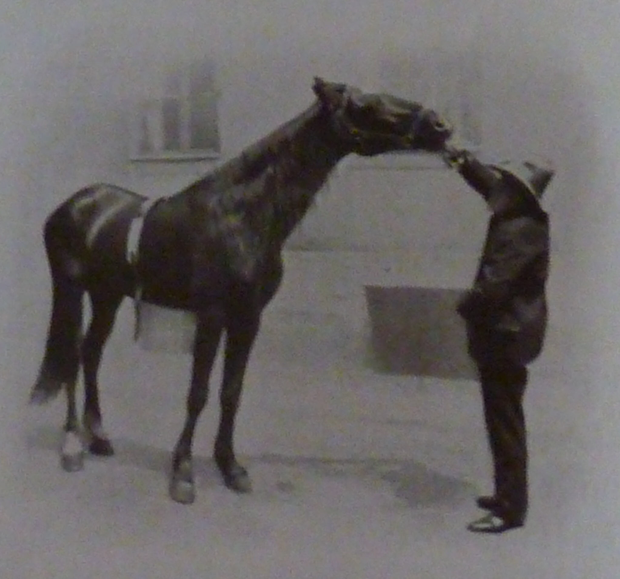 Der kluge Hans trinkt Bier.